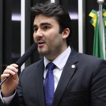 Foto do Deputado Federal Caio Narcio tirada em pronunciamento na Câmara Federal